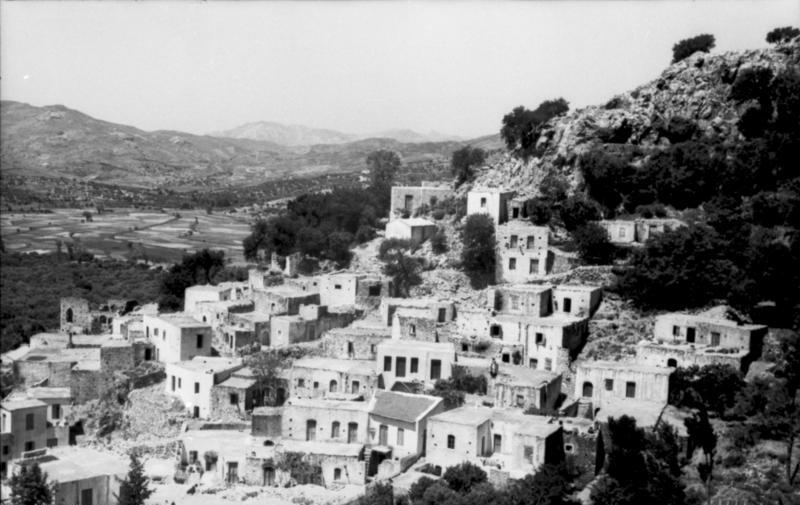 6. Juni 1943 An der Südküste Kretas Die Südküste Kretas wird jetzt besonders von den deutschen Besatzungstruppen ausgebaut. Ano Wianos ein malerisches Gebirgsdorf im Süden, wird jetzt eine Straße nach Iccapetra ausgebaut. Das Dorf Ano-Wianos